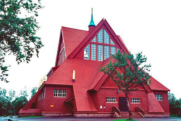 Sujet:D'Kierch zu Kiruna